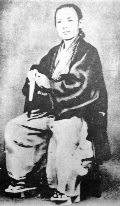 a Japanese man 井上馨 (Kaoru Inoue)